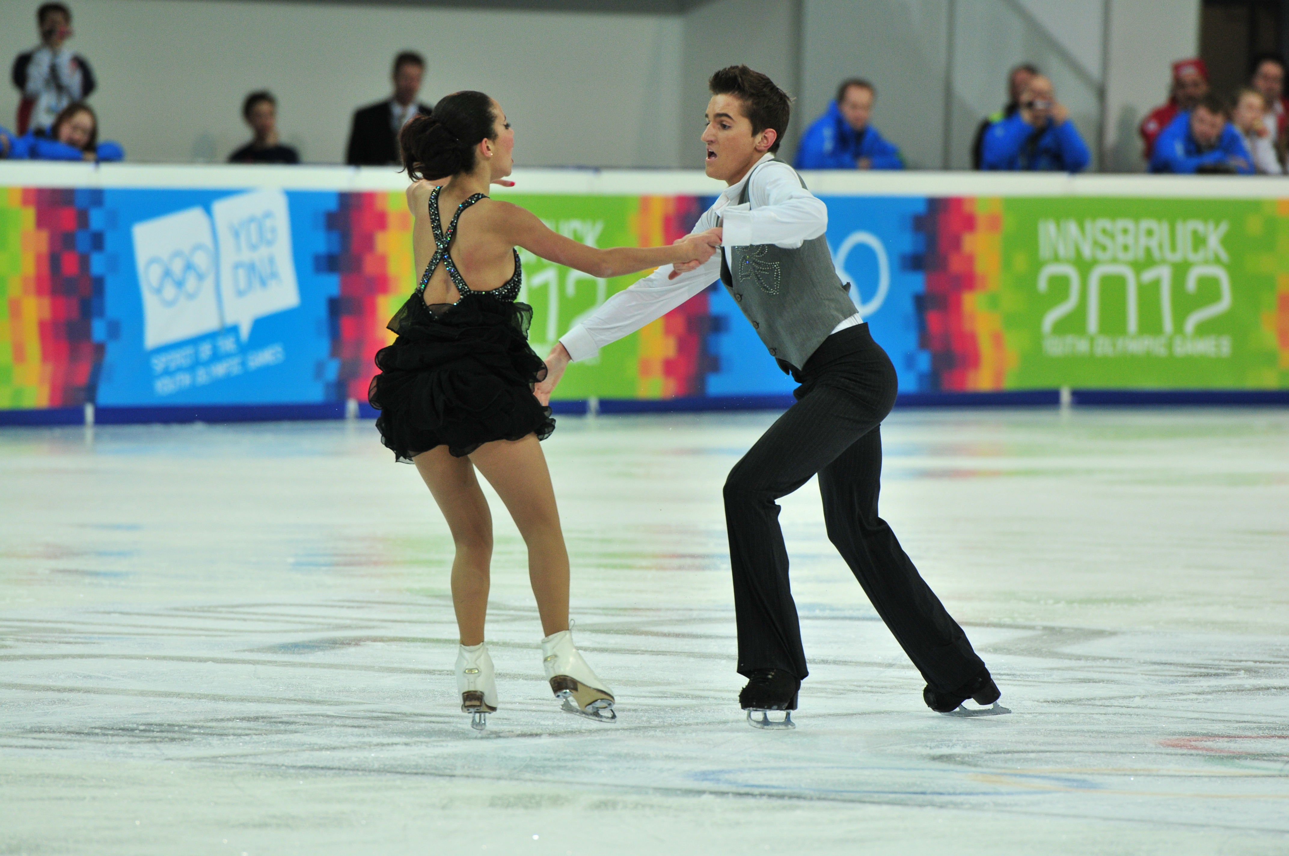 1. Jugendolympiade 2012 Innsbruck